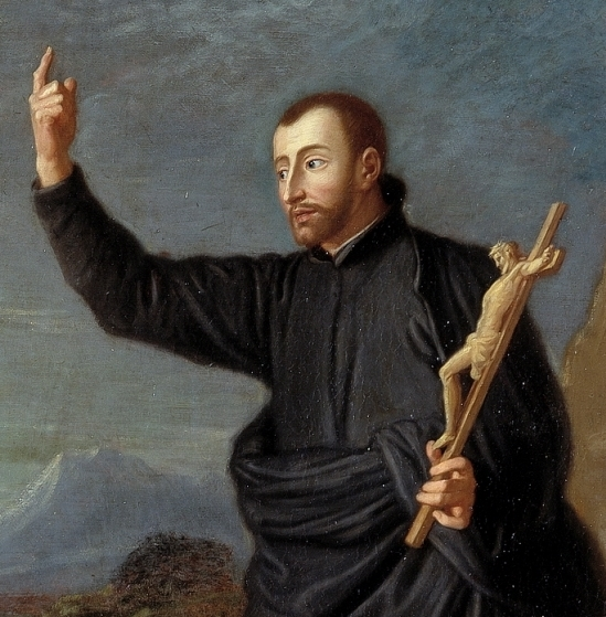 San Juan Francisco de Regis predicando. Museo del Prado. Madrid. España.